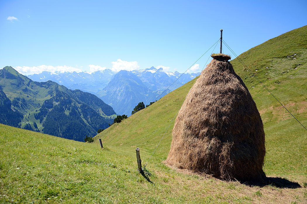 Wildheu-Triste im Kanton Schwyz